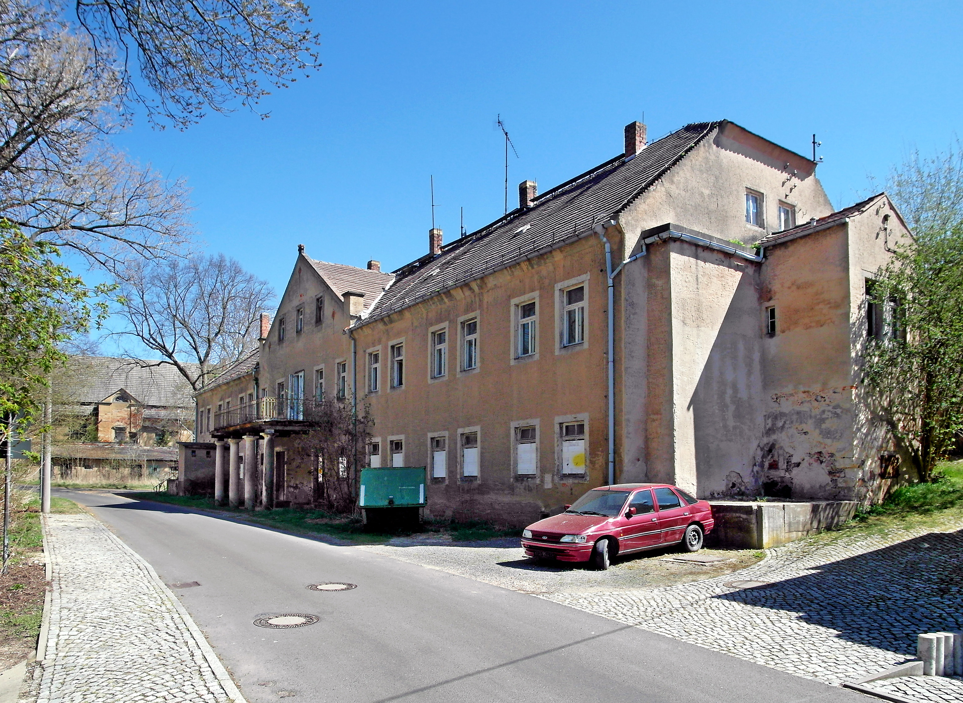 20.04.2015 01665 Löthain (Käbschütztal): Rittergut, Herrenhaus Löthain, Am Römerhaus 3A (GMP: 51.143225,13.410211) [SAM9927.JPG]20150420505DR.JPG(c)Blobelt